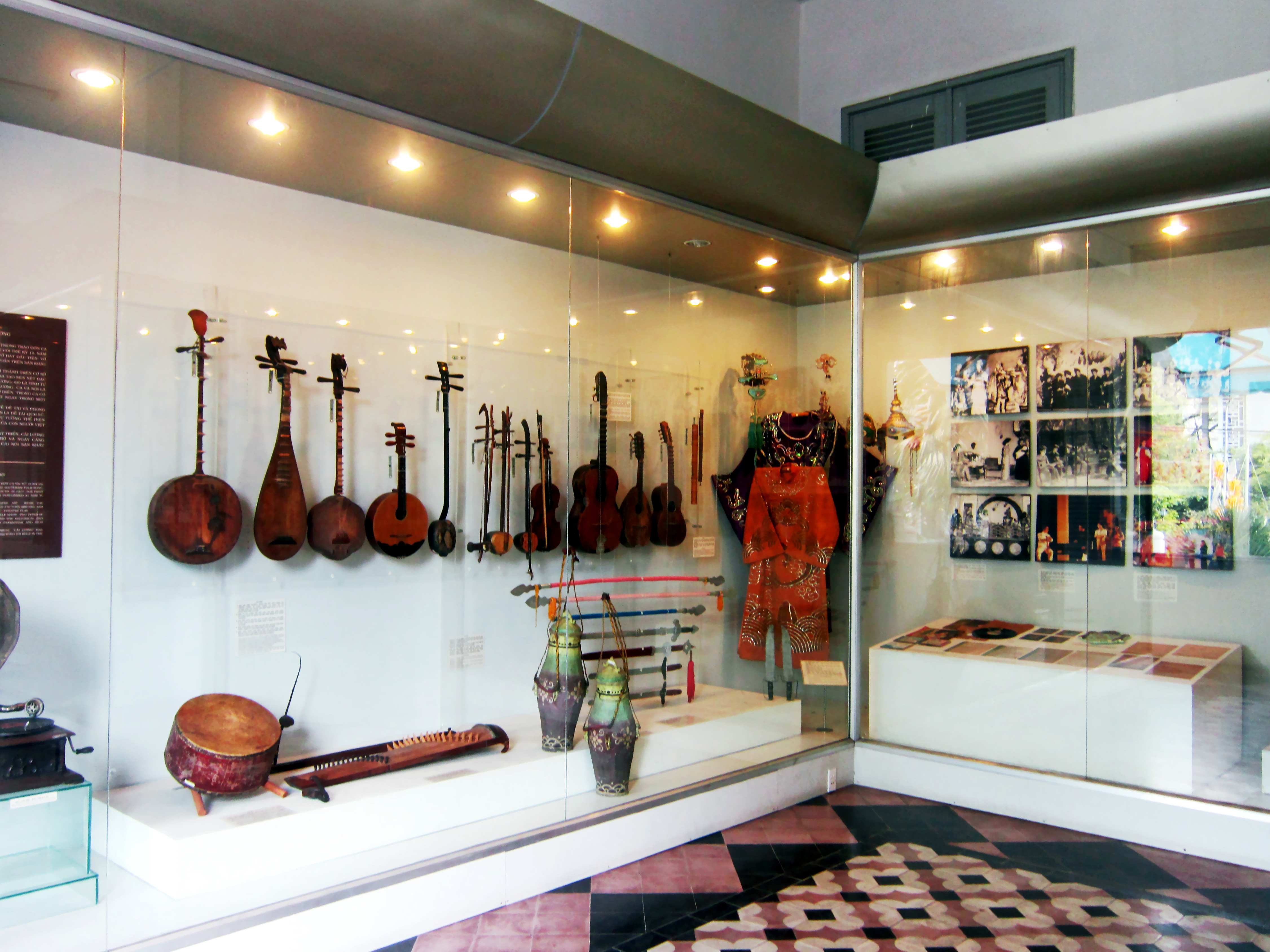 Phòng trưng bày nghệ thuật cải lương (trong phần trưng bày văn hóa ở đầu thế kỷ 20) trong Bảo tàng Thành phố Hồ Chí Minh, Việt Nam.